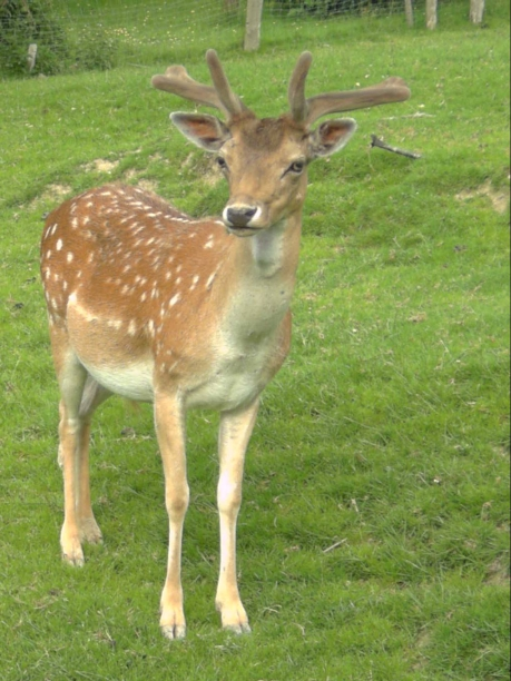 Damhirsch (Dama dama) im Sauerland (Germany)